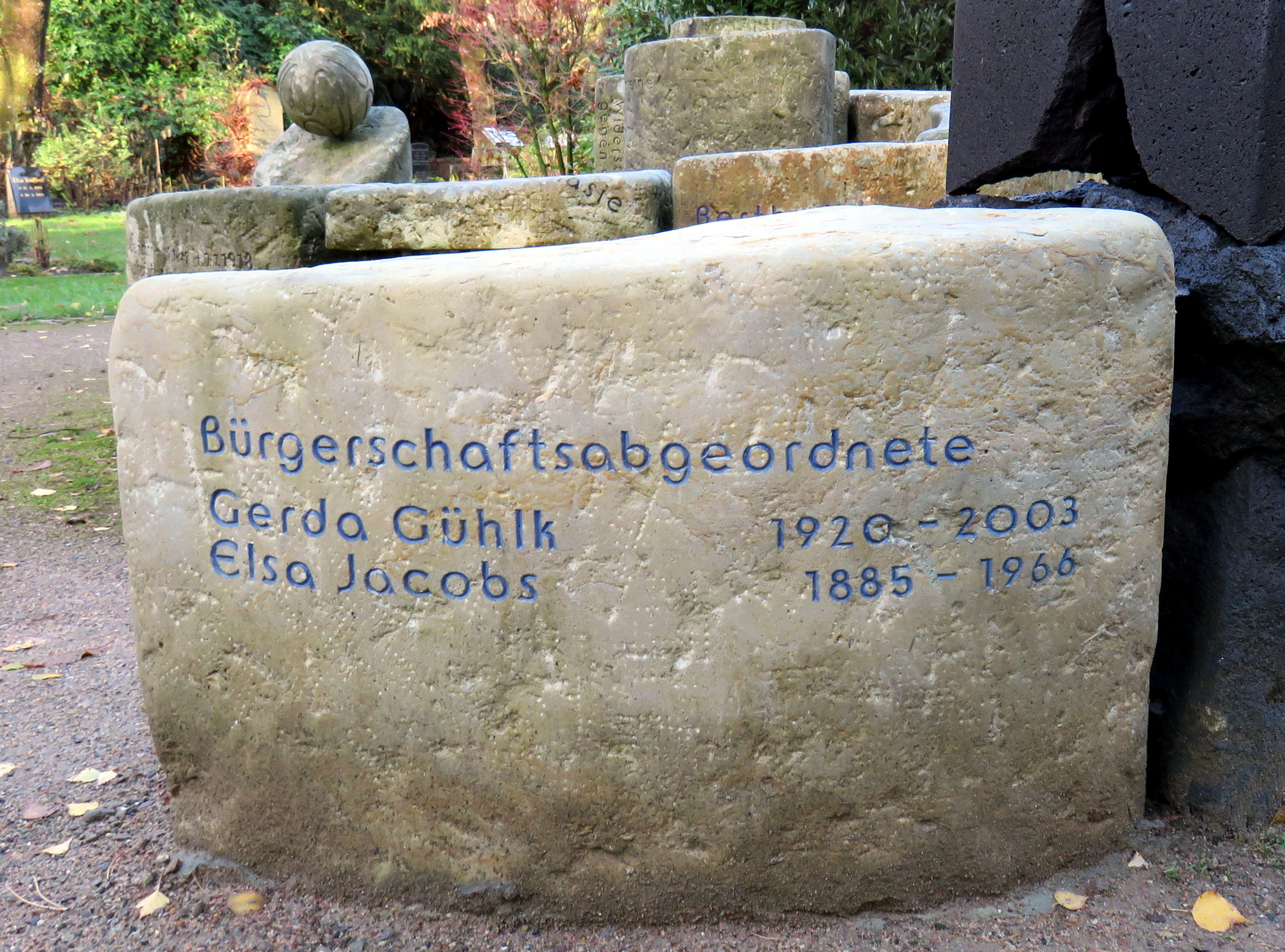 Gedenkstein für die Hamburger Bürgerschaftsabgeordneten Gerda Gühlk und Elsa Jakobs in der Erinnerungsspirale im Bereich des Gartens der Frauen auf dem Ohlsdorfer Friedhof in Hamburg-Ohlsdorf.